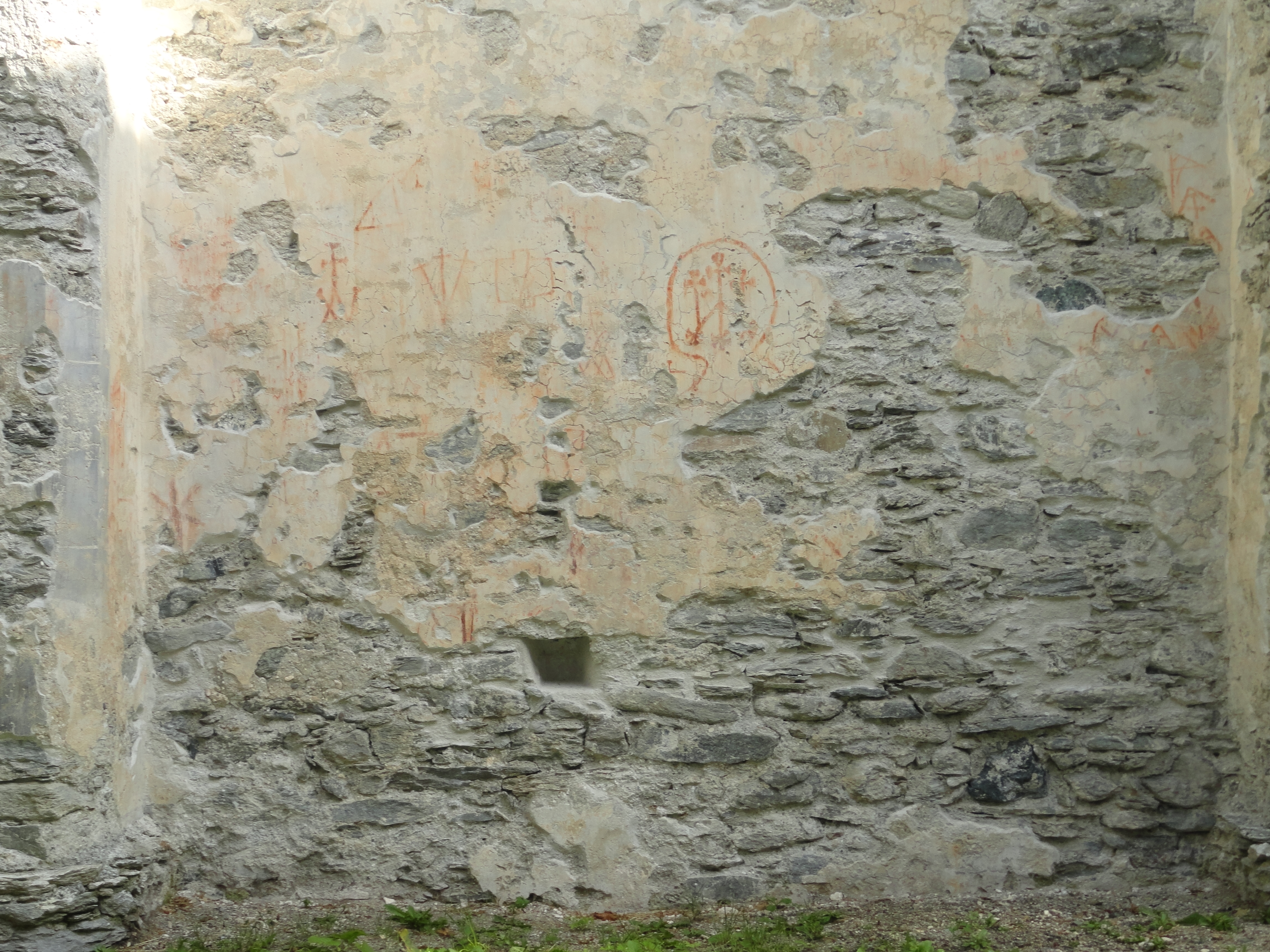 Kirchenruine San Gaudenzio Nordwand